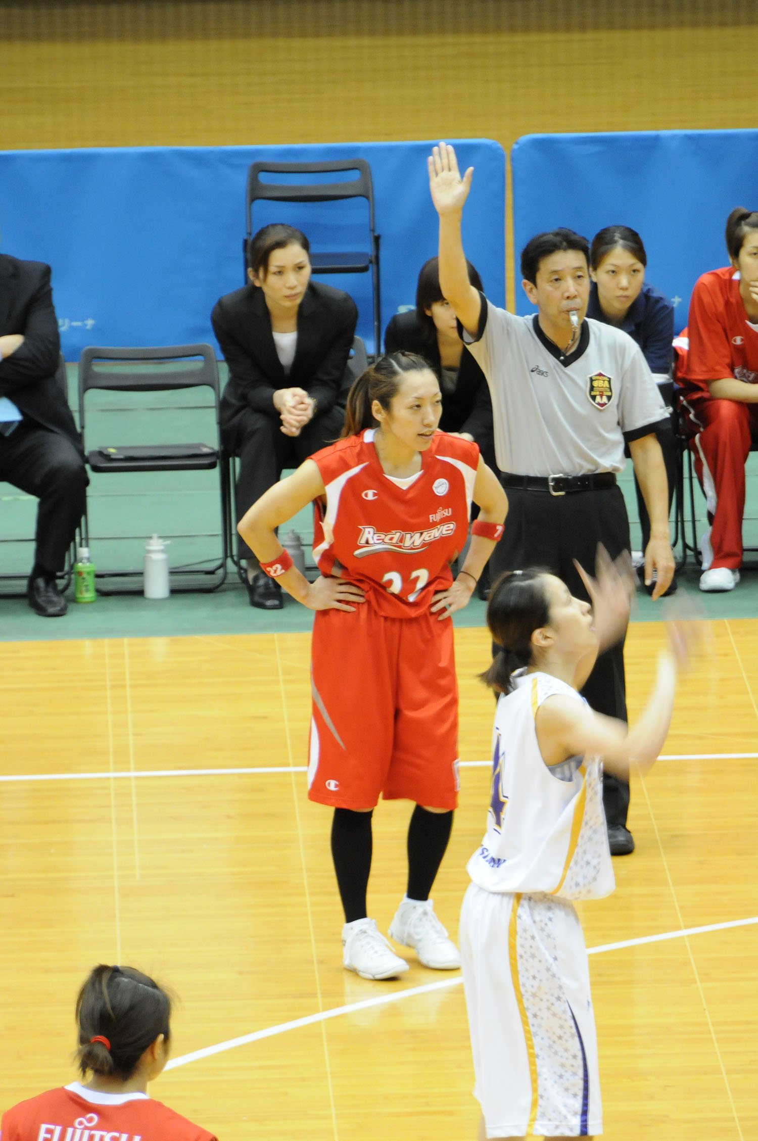 富士通レッドウェーブ、立川真紗美選手。とどろきアリーナで。